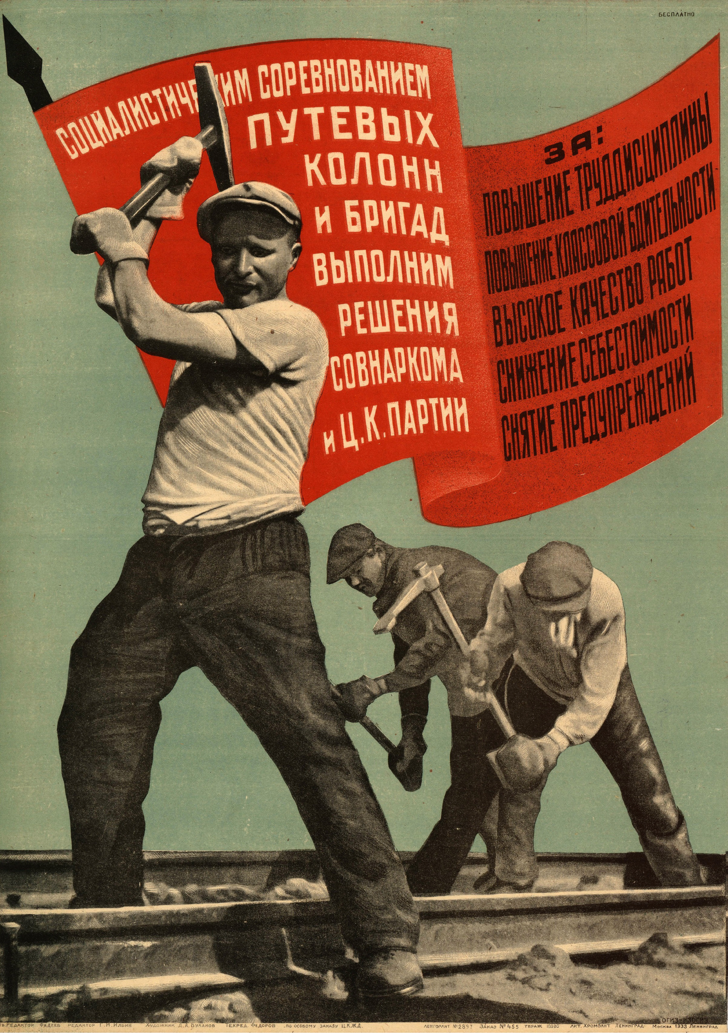 Социалистическим соревнованием путевых колонн и бригад выполним решения совнаркома и ЦК партии : [плакат] / худож. Д. А. Буланов ; отв. ред. Фадеев ; ред. Г. И. Ильин ; техн. ред. Фёдоров. — Москва ; Ленинград : ОГИЗ—ИЗОГИЗ, 1933 (Ленинград : Литография «Хромолит»). — Автотипия, офсет, 1 лист, 61 × 43 см. — 10 000 экз.